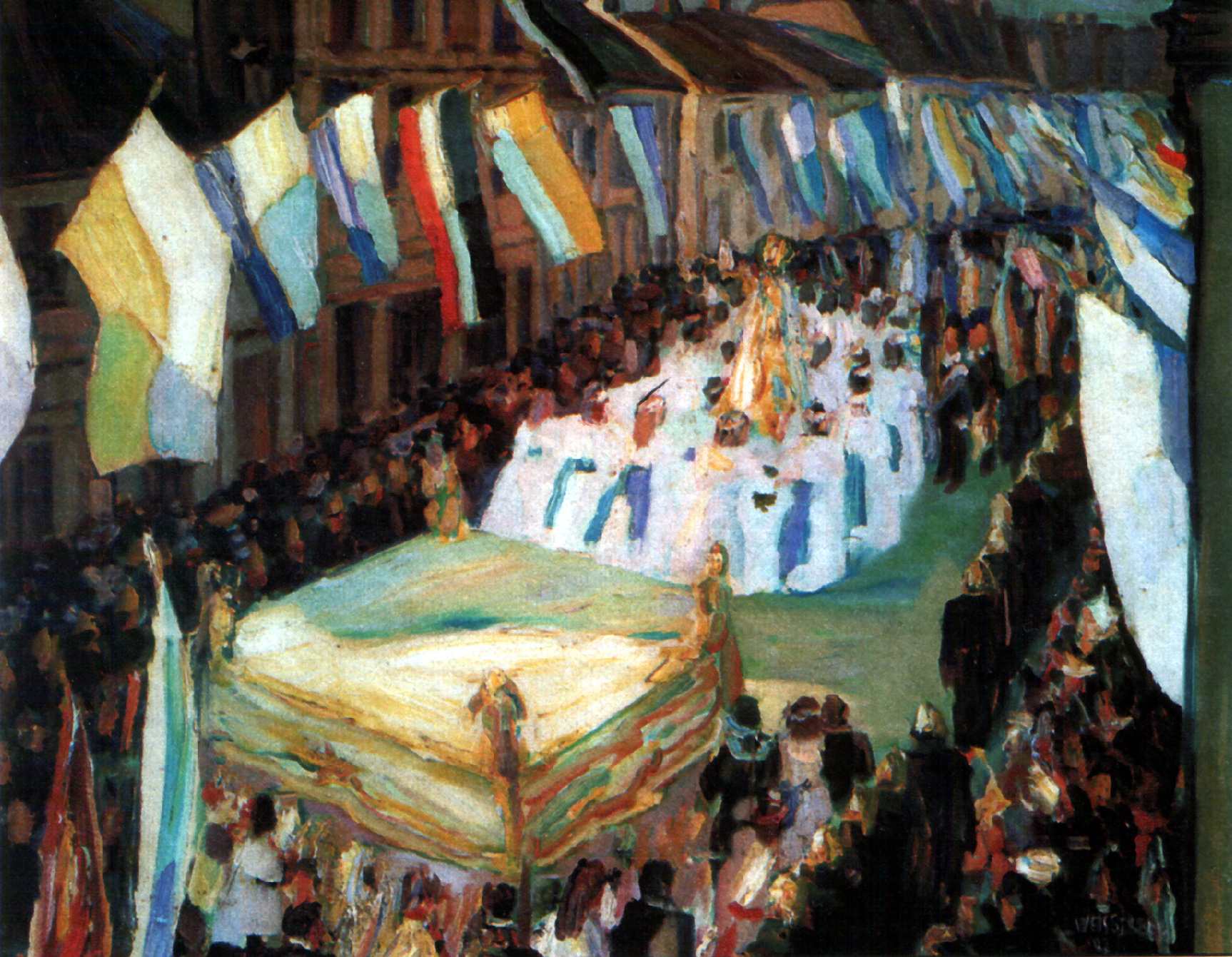 Prozession in St. Ingbert, (1907) von Albert Weisgerber (1878-1915), Saarland-Museum, Saarbrücken